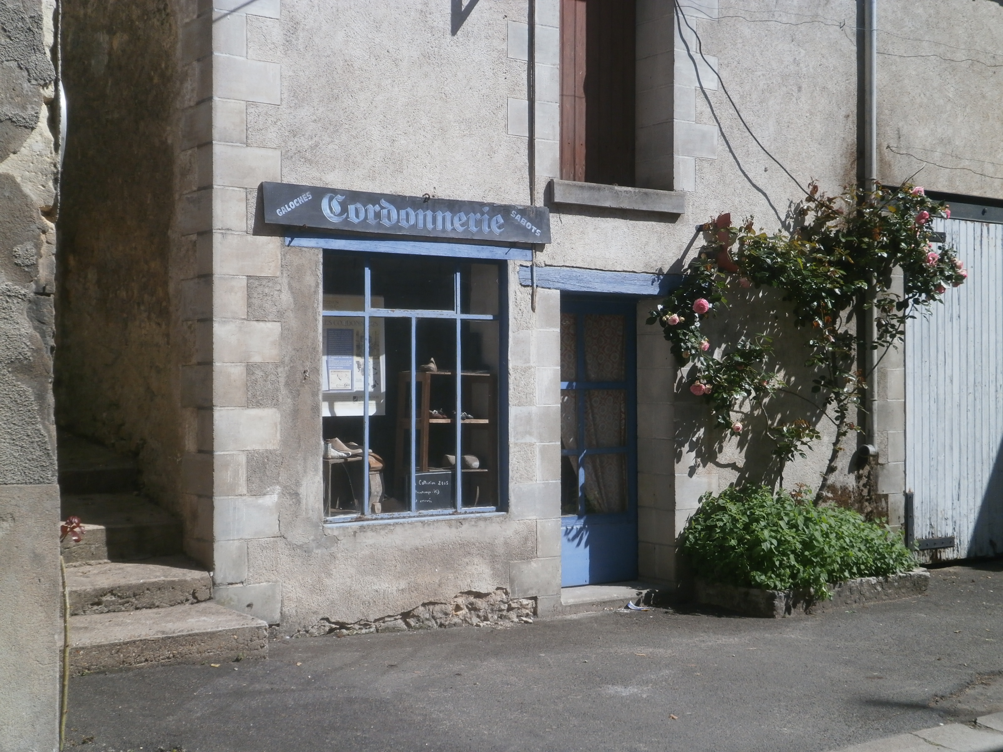 Ancien magasin à Montrésor